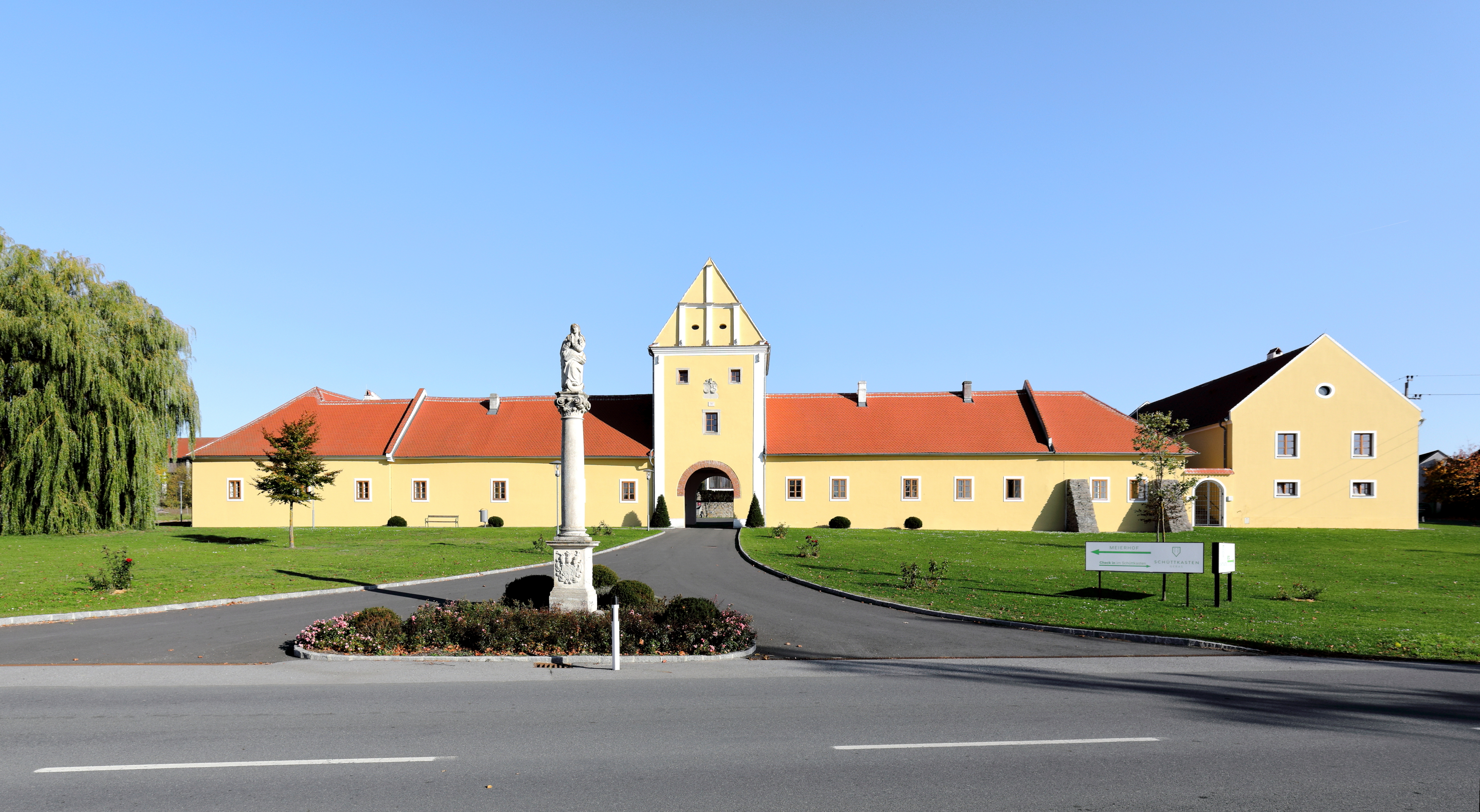 Westansicht des Meierhofes des Stiftes in der niederösterreichischen Stadtgemeinde Geras und davor eine Mater-Dolorosa-Säule aus der 2. Hälfte des 17. Jahrhunderts.Nach einem Brand im Jahr 1643 wurde der Meierhof in Form einer vierflügeligen Anlage neu erbaut. Der Torturm ist im Westen errichtet, hat eine tonnengewölbte Einfahrt und ist mit 1666 datiert.